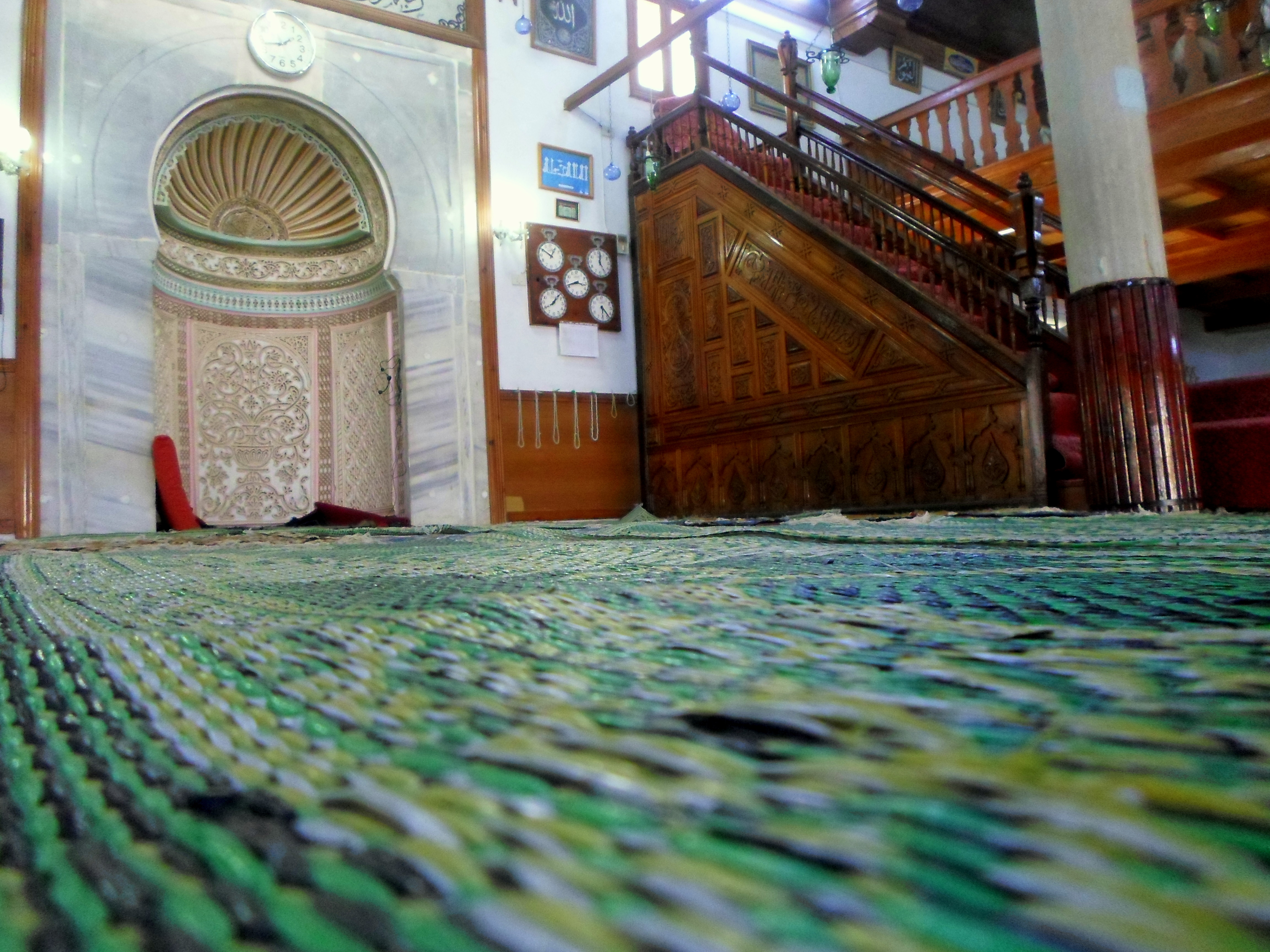 Mosquée du Bey